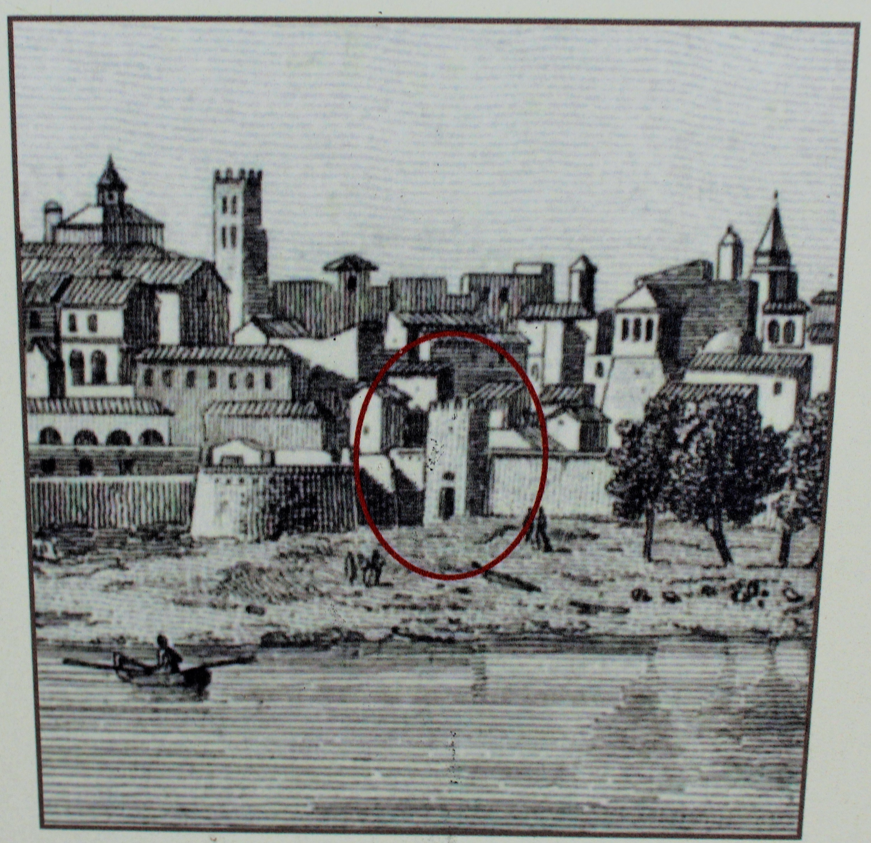 Antiguo plano